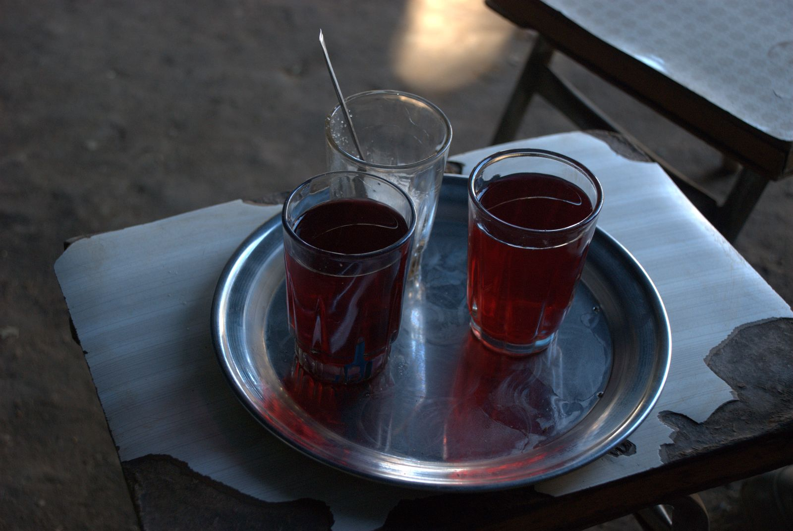 seen in tea stall